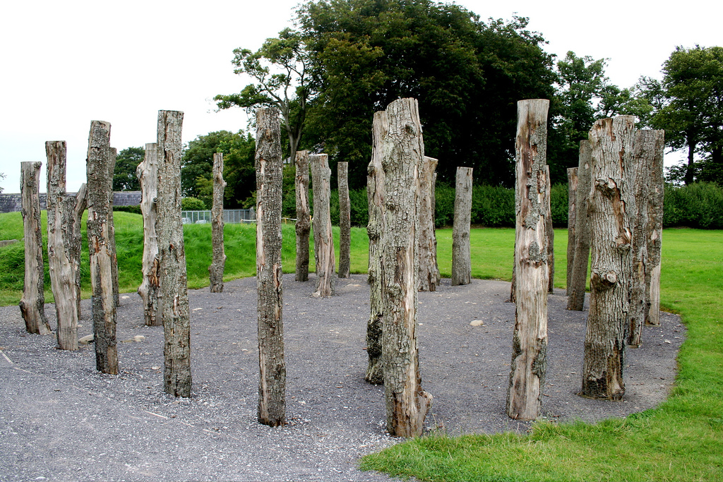 Yacimiento arqueológico de Knowth